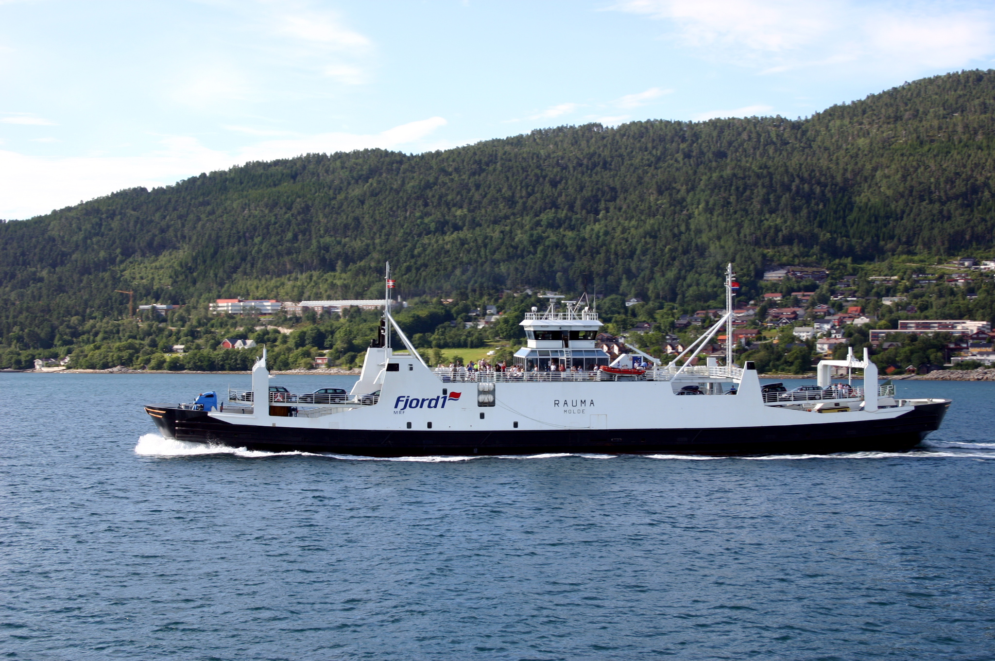 MF Rauma